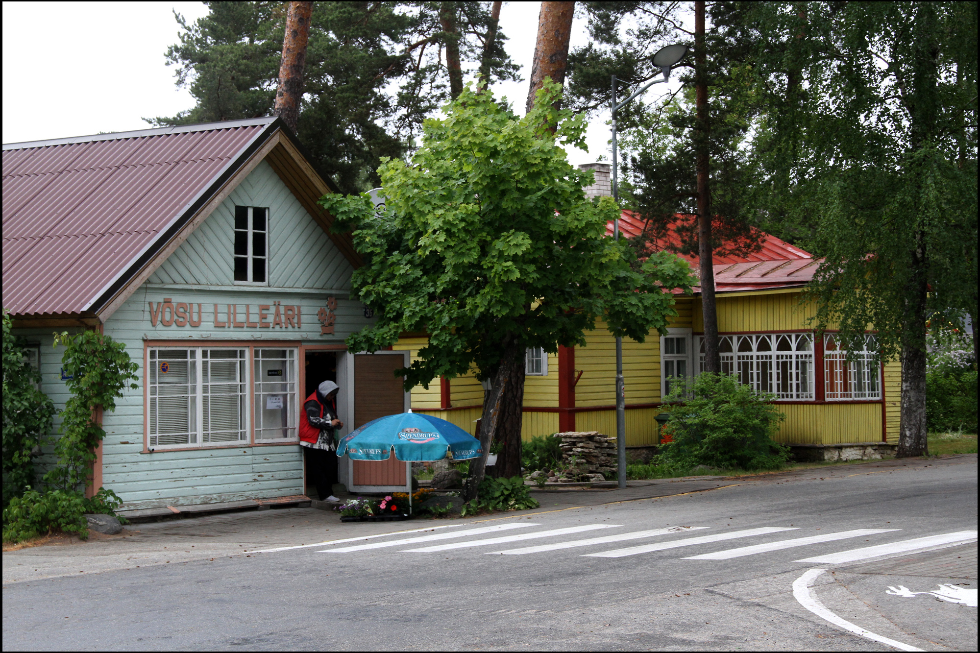 Vösu, Strassenszene